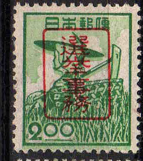 japanese election stamp（日本の選挙切手）